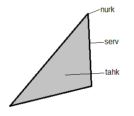 Kolmnurke hulknurk.